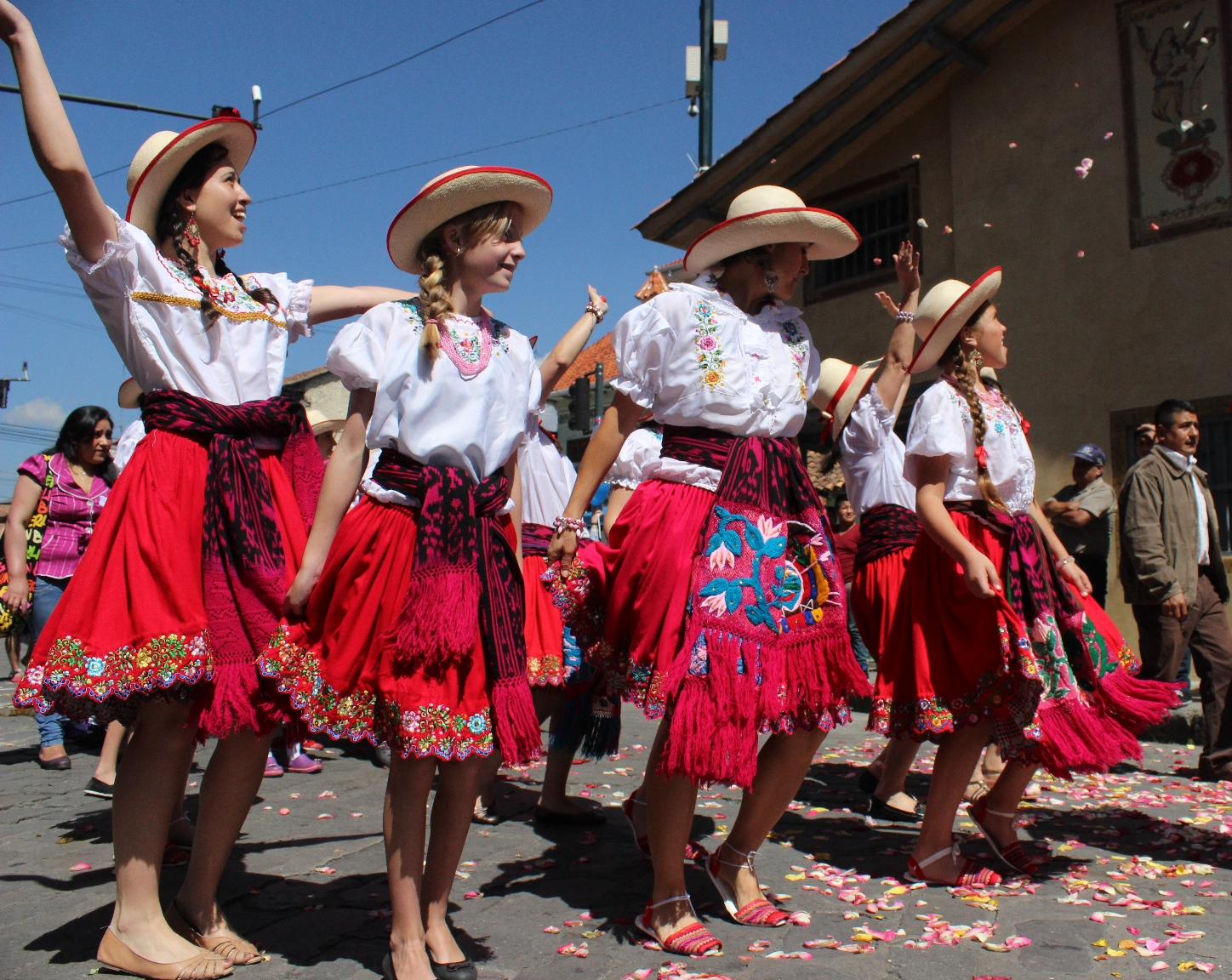 Jóvenes con el traje de chola cuencana durante el Pase del Niño Viajero 2013 en Cuenca (Ecuador).